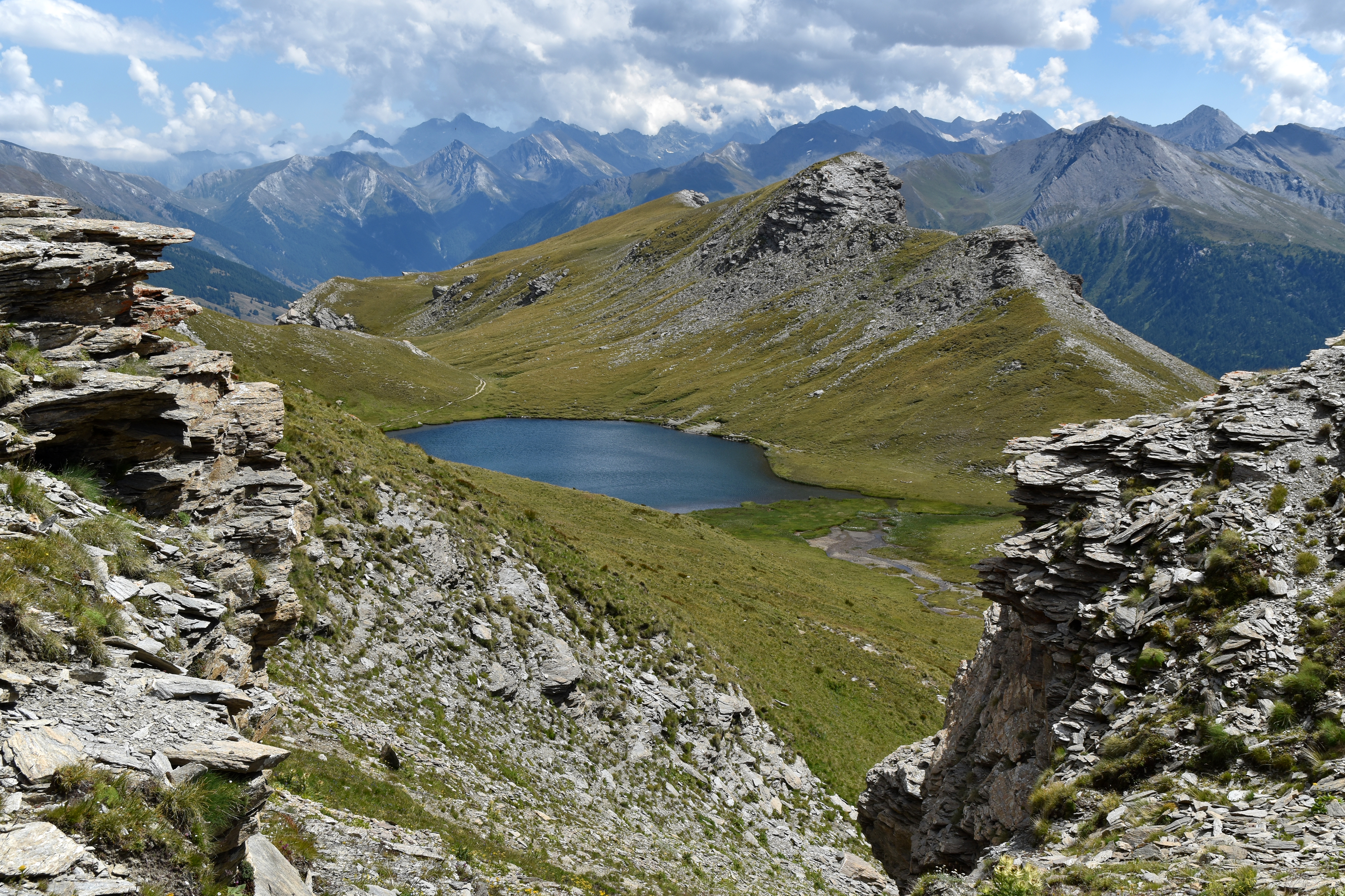 Lac Mézan, Aiguilles,Queyras, Hautes-Alpes, France